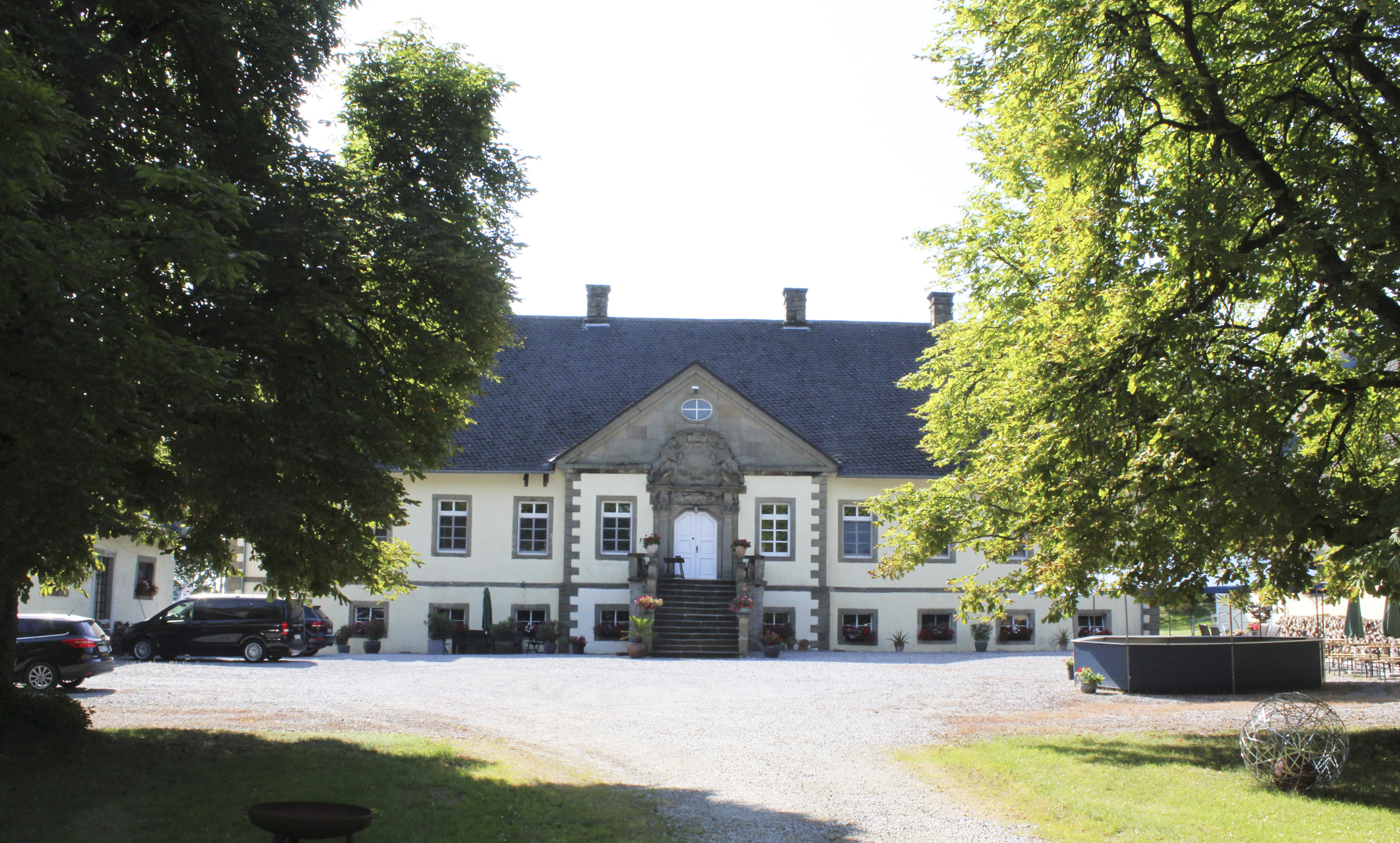 Haus Almerfeld, Gut Almerfeld, Gutshof, Wohnsitz